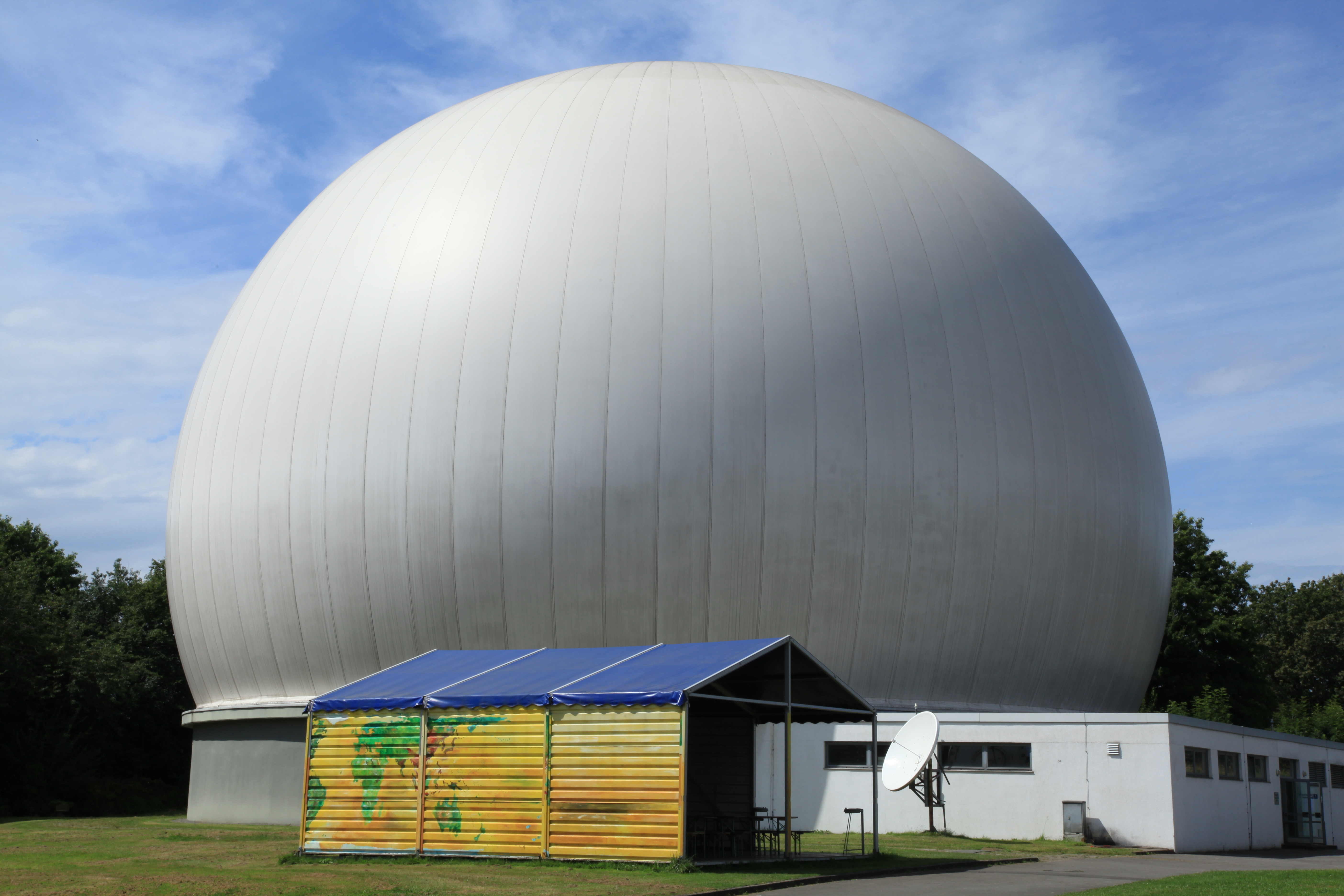 Sternwarte Bochum an der Blankensteiner Straße in Bochum